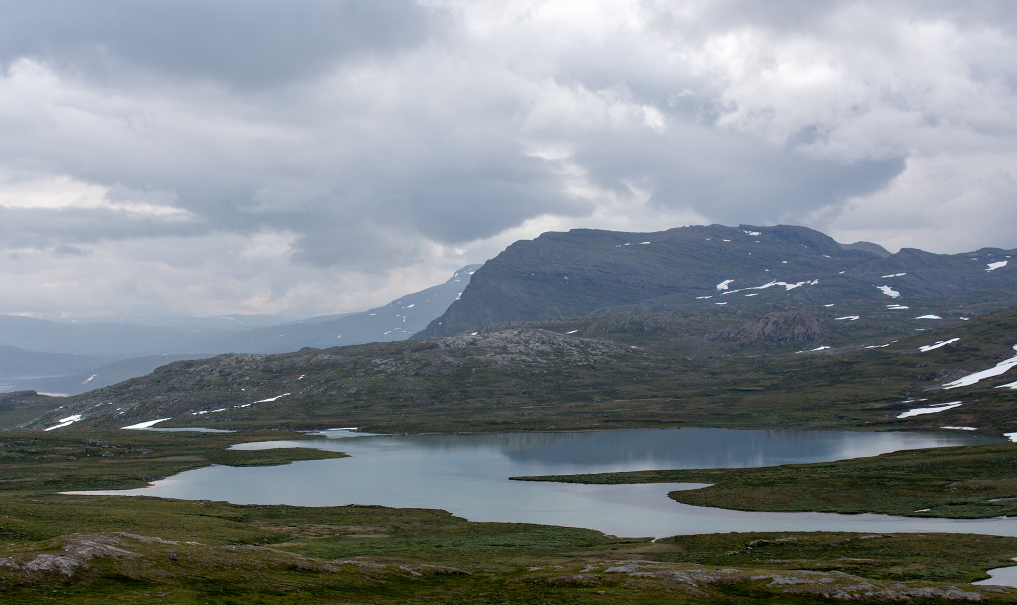 Gásakluoppal med Goabrek i bakgrunden.